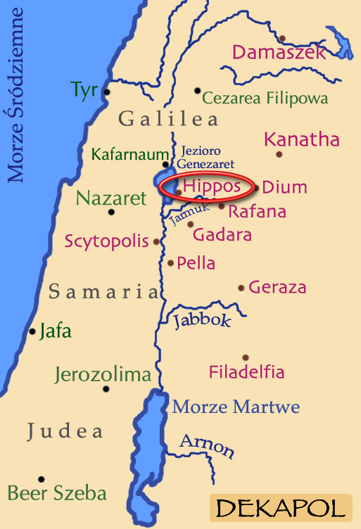 Mapka Dekapolu z zaznaczoną Hippos.